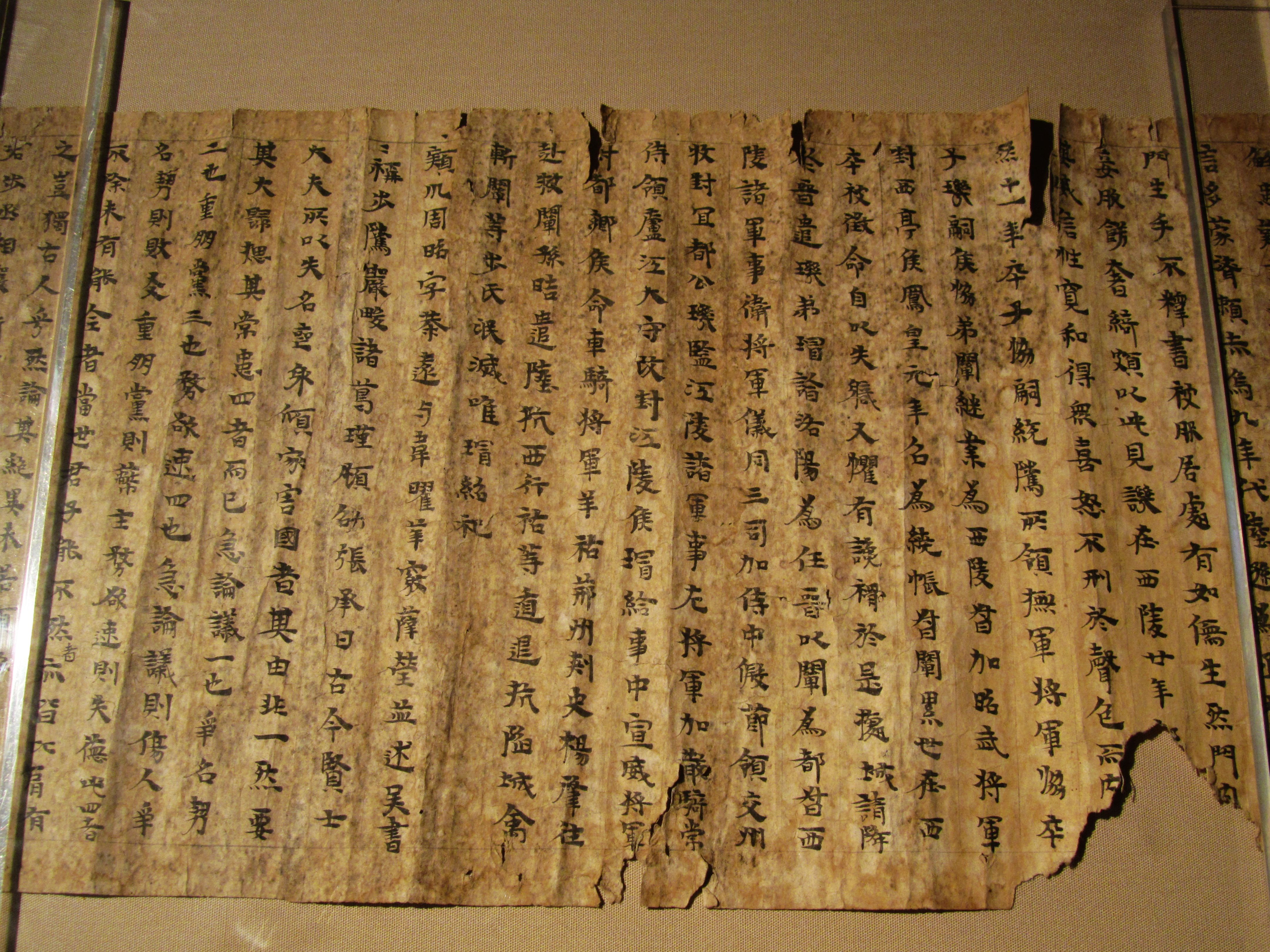 三国志步骘传残卷，东晋隶书抄本，高24.2厘米，宽42厘米，现存25行，440字，保存了传记的后半部和评语的前半部，藏经洞出土，敦煌研究院藏。